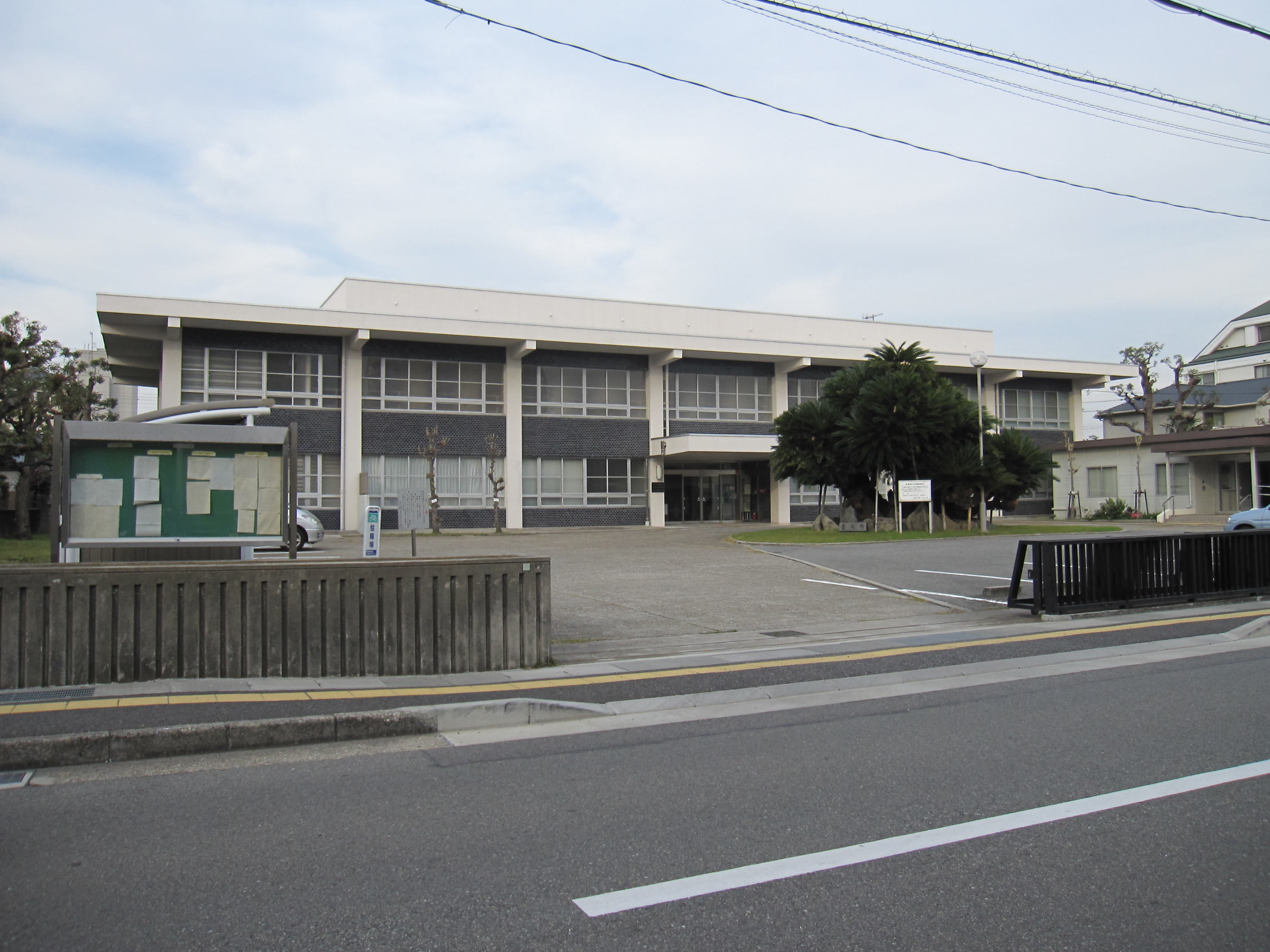 明石簡易裁判所